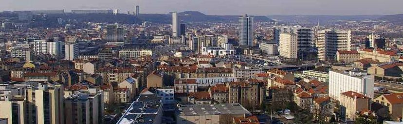 Skyline du centre-Est de Nancy, une des plus grande densité d'IGH en France hors Paris.